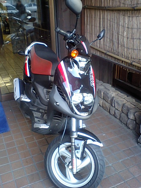 PGO PMX110